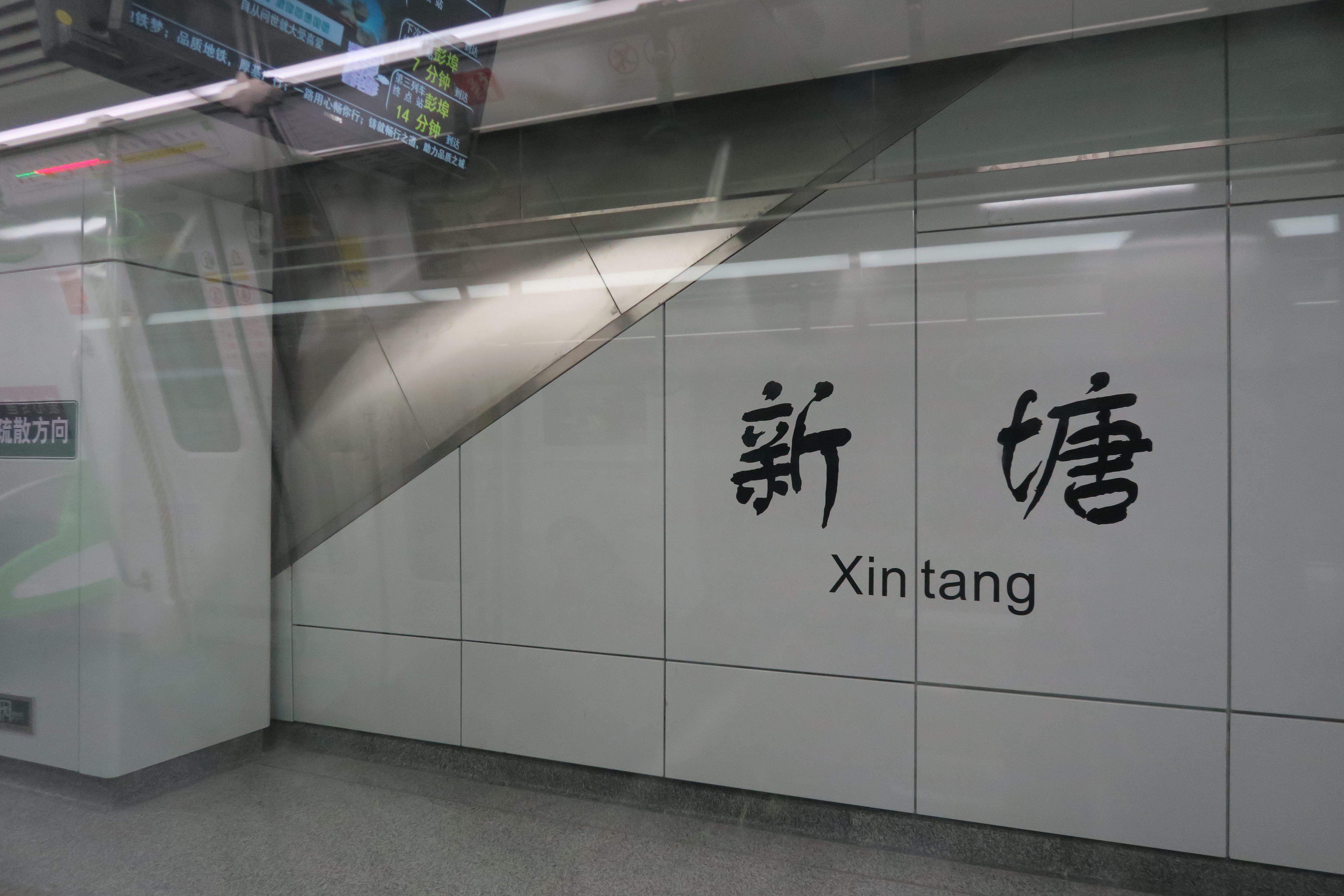 杭州地铁新塘站（暂缓开通）